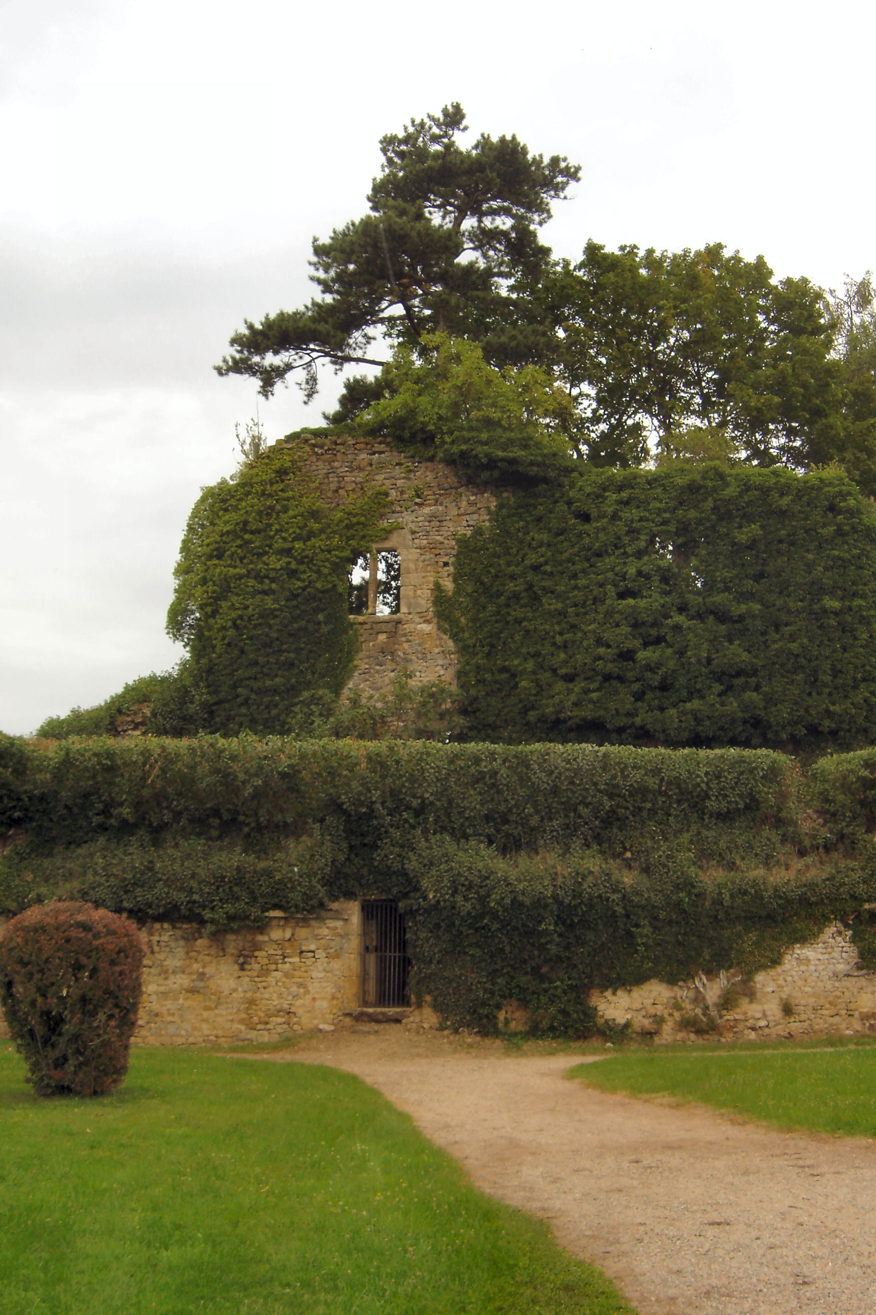 chateau de Moulins-engilbert2-morvan